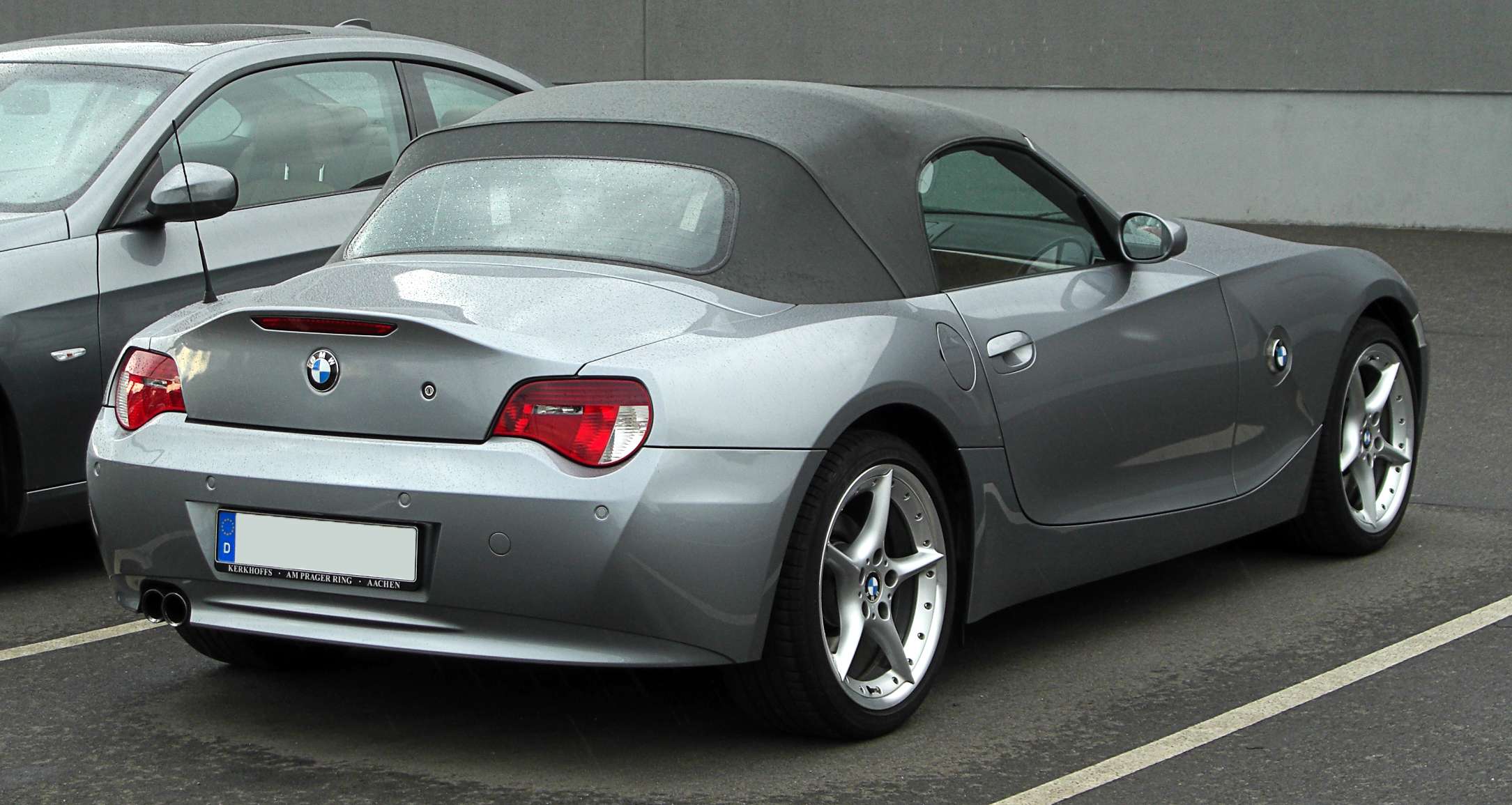 BMW Z4 (E85, Facelift)